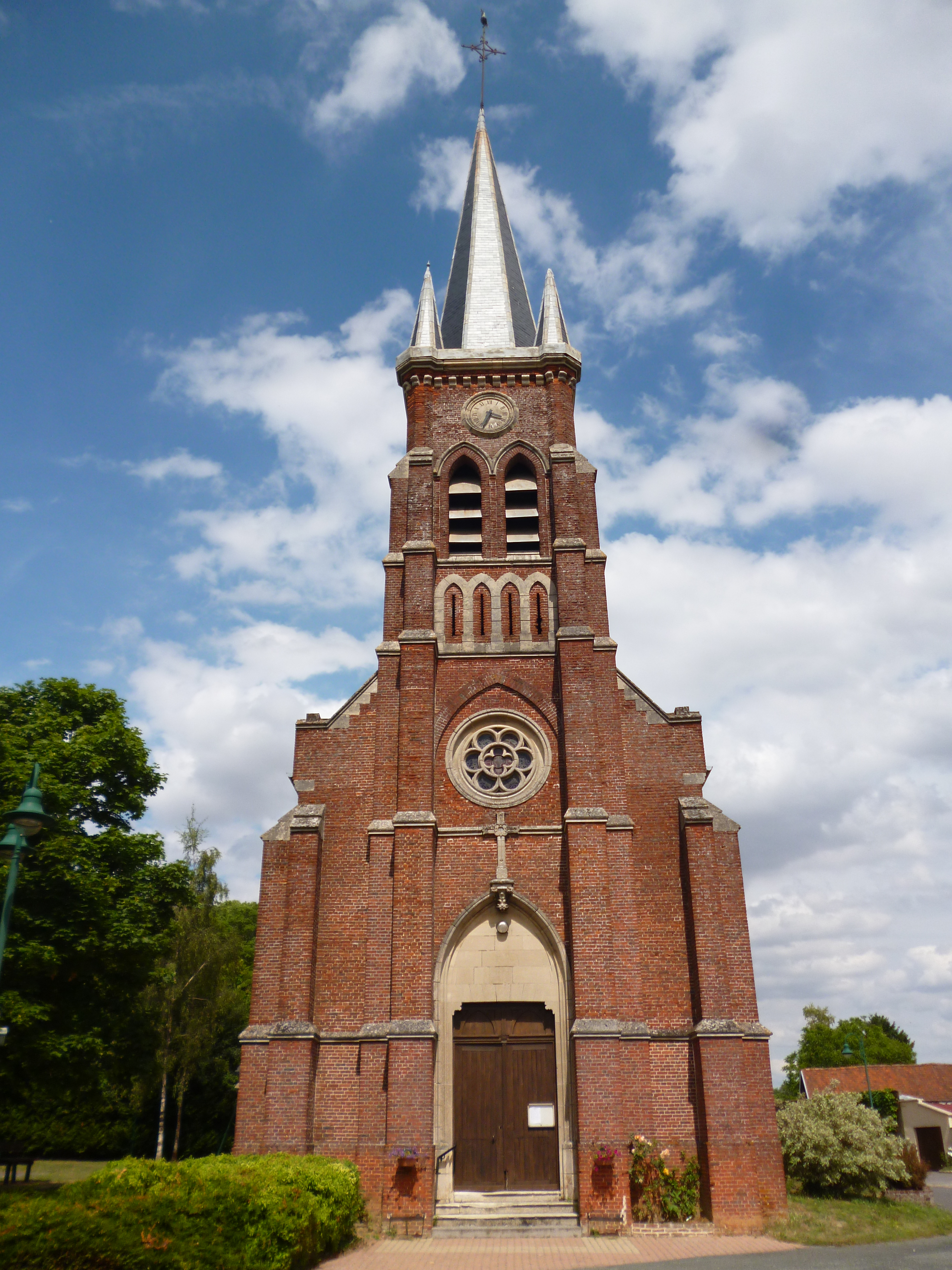 Église Saint-Denis de Beauvoir (Oise, France).